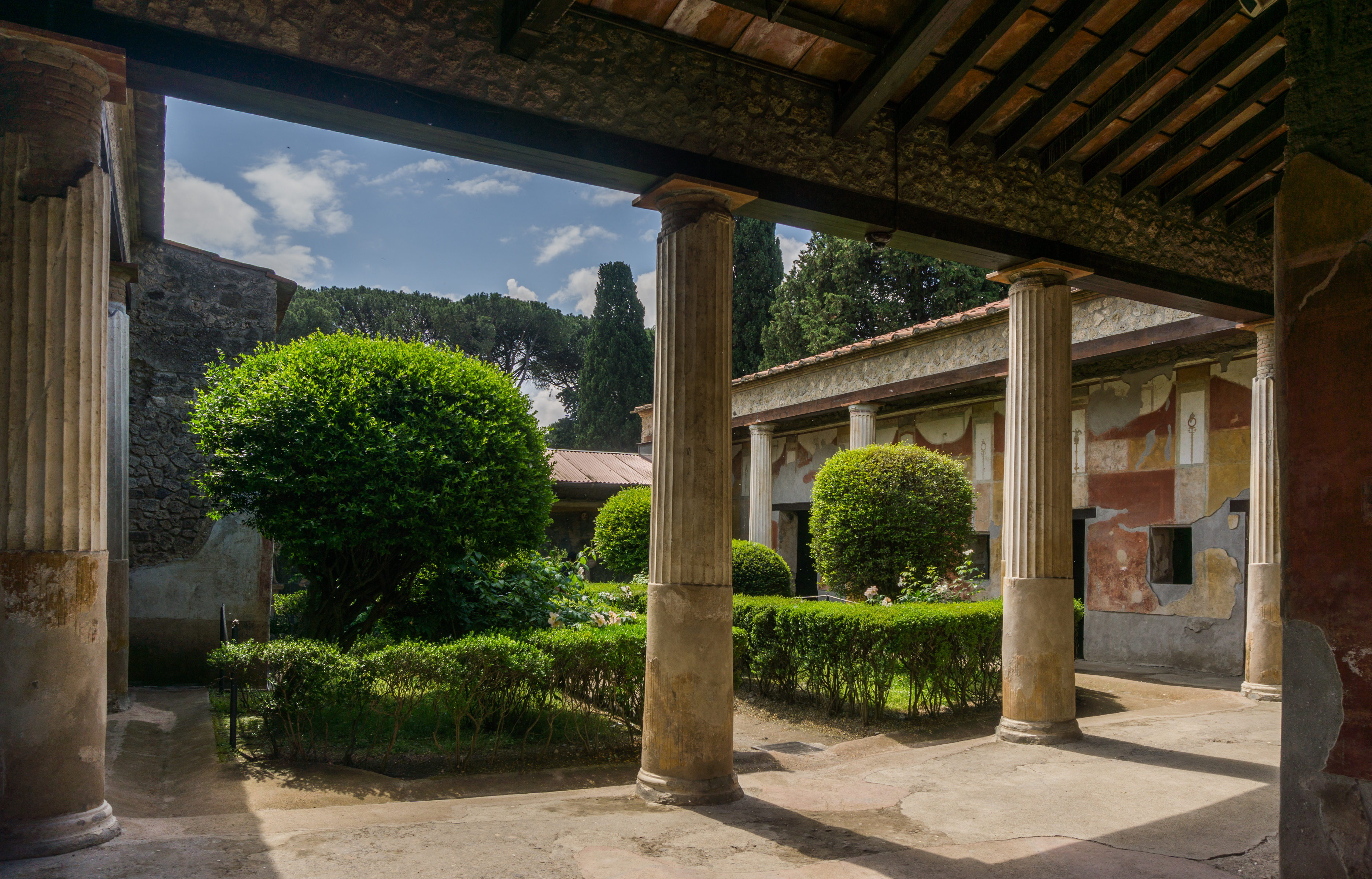 casa delle Venere in Conchiglia (II.3.3) This is a photo of a monument which is part of cultural heritage of Italy.